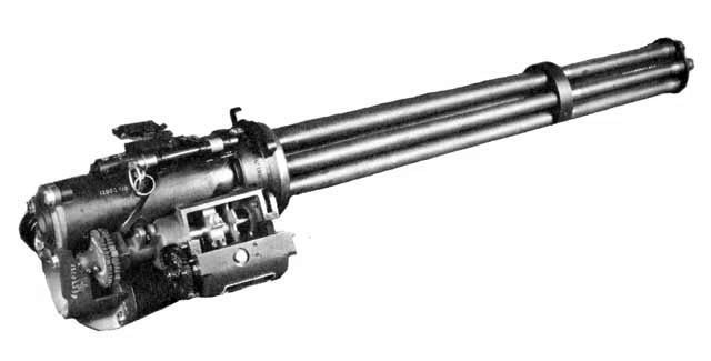 XM 214 5,56 mm Minigun